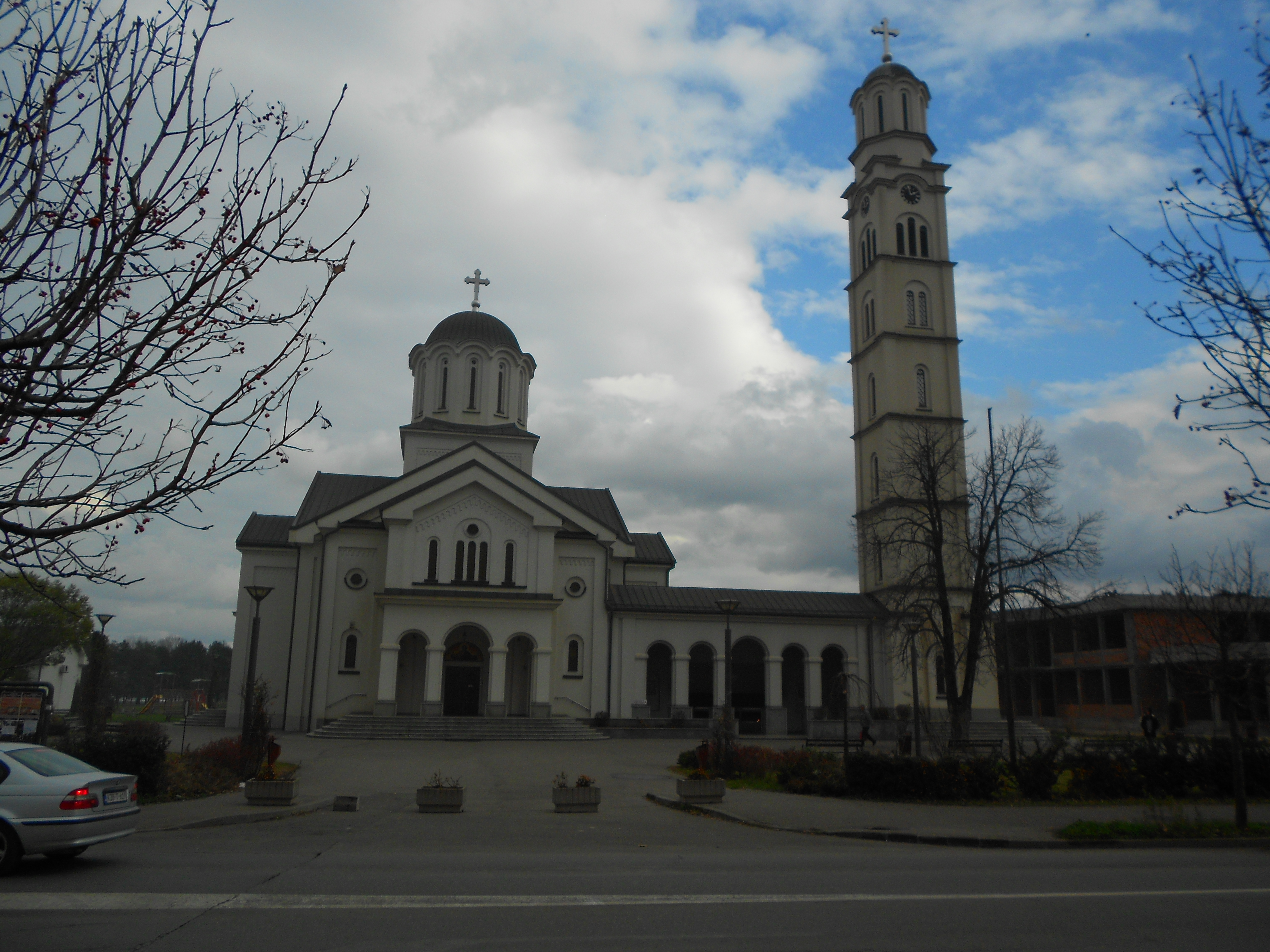 Саборна црква у Бијељини